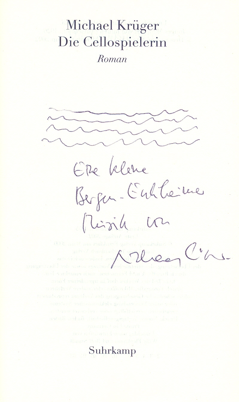 Autograph von Michael Krueger